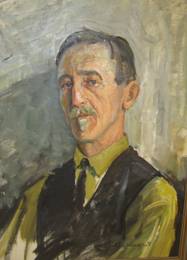 Karl Imenes, malt av Sigurd Undeland (1931). Foto av maleri: Johannes S. Havstad